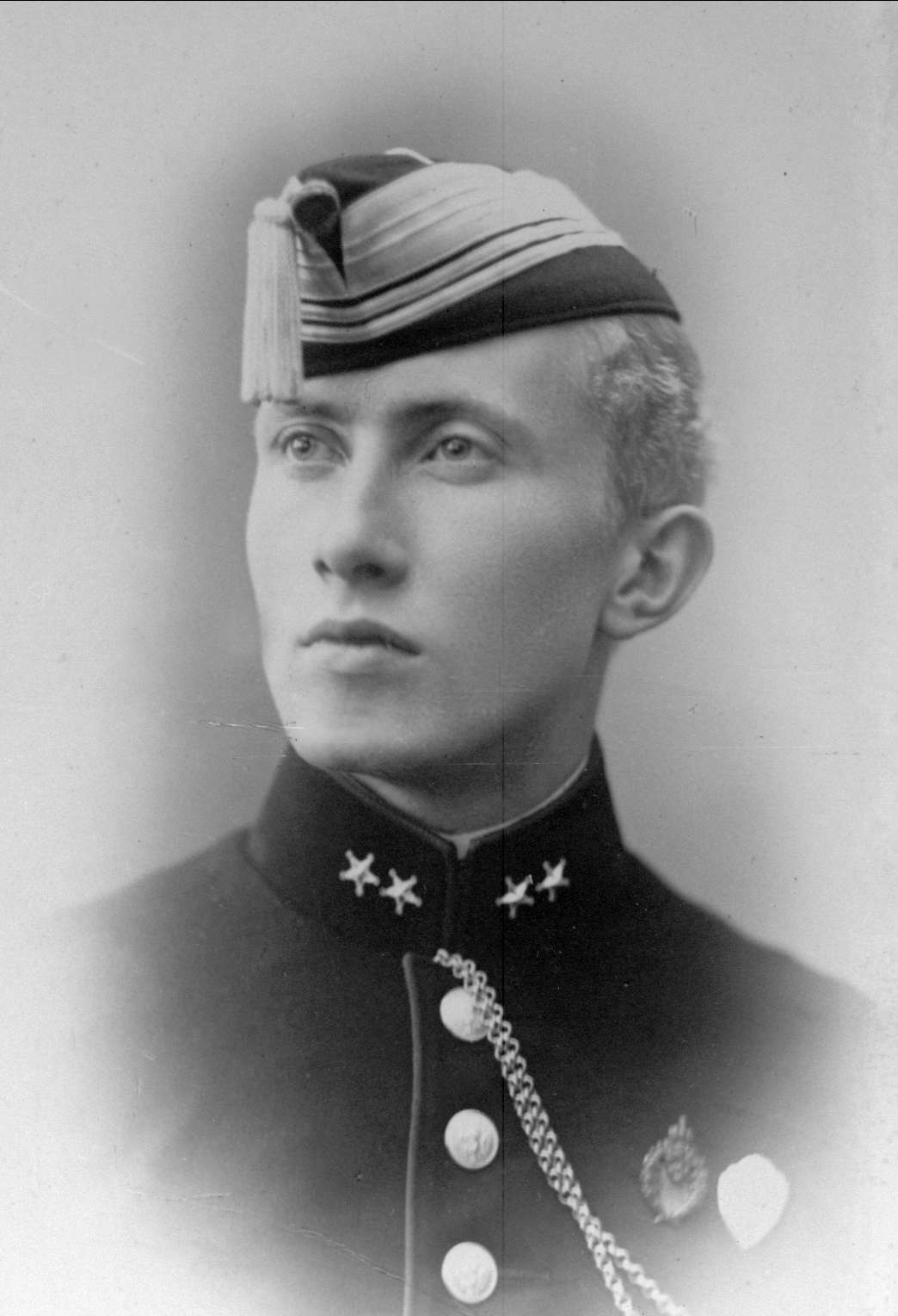 John Ingebrigt Rognes (1902-1949), ca. 1924